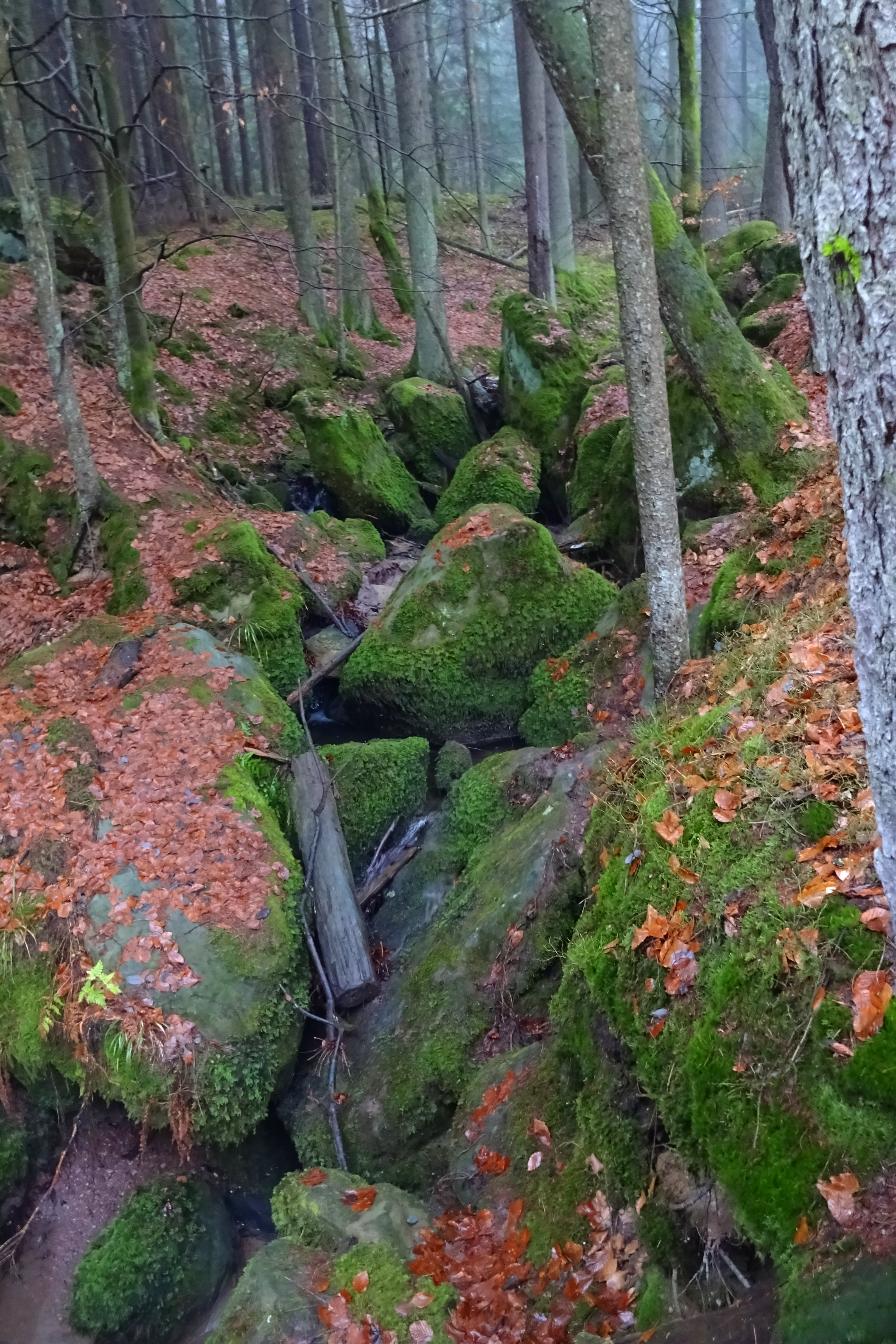 Naturschutzgebiet „Teufelsloch“ Nähe Oberwaiz, Eckersdorf. Geotop (472R019) und Naturschutzgebiet (NSG-00035.01)